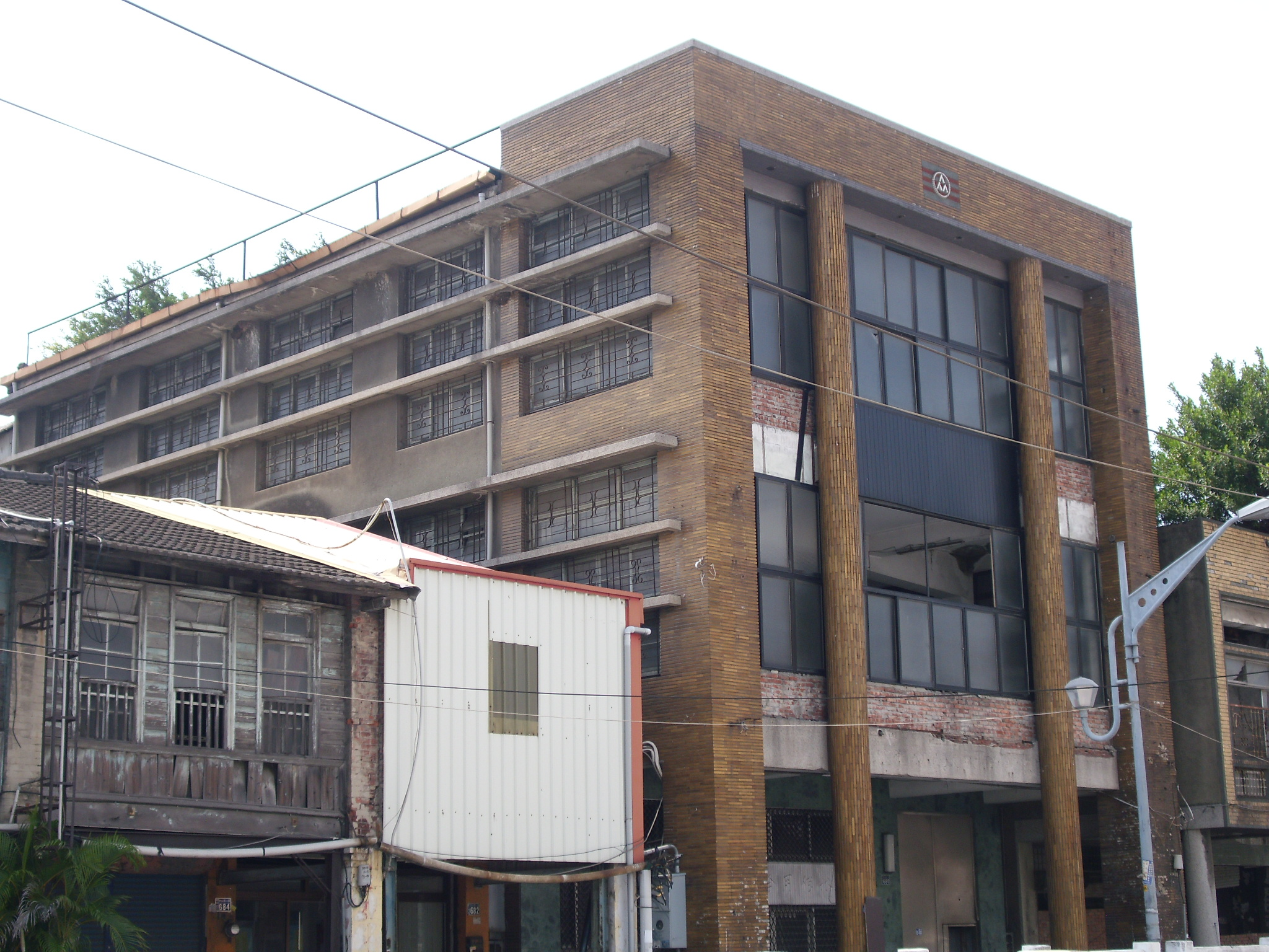 Bân-lâm-gú: 彰化縣員林信用合作社總社，樓高三層。